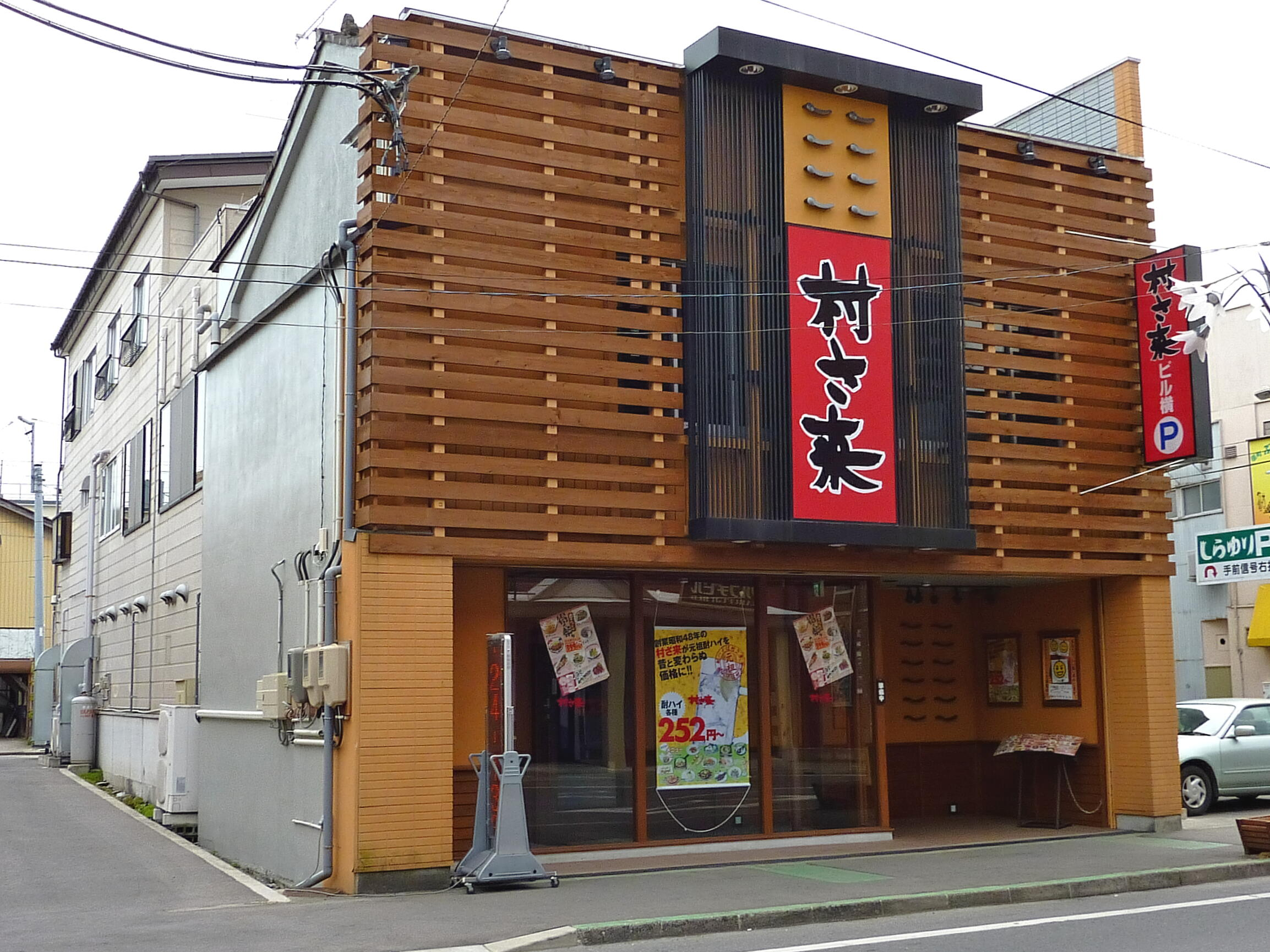 村さ来原町店